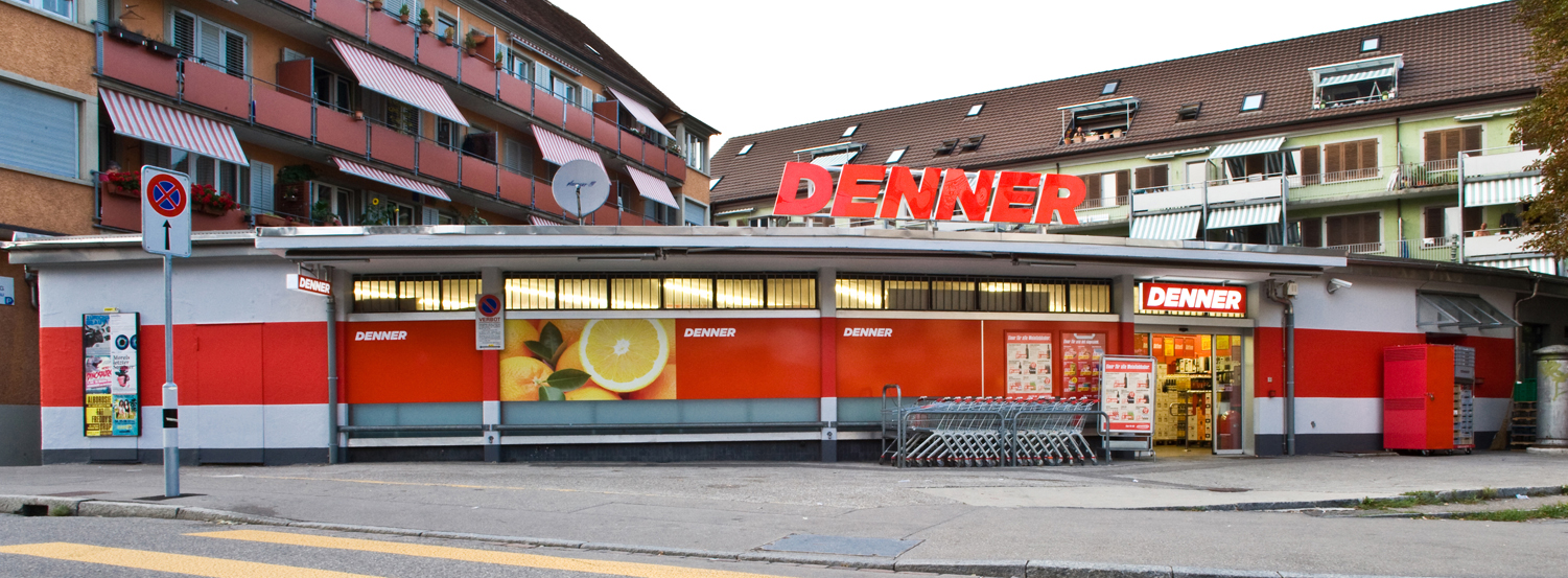 Filiale des Discounter Denner AG an der Uetlibergstrasse 102 in 8045 Zürich.